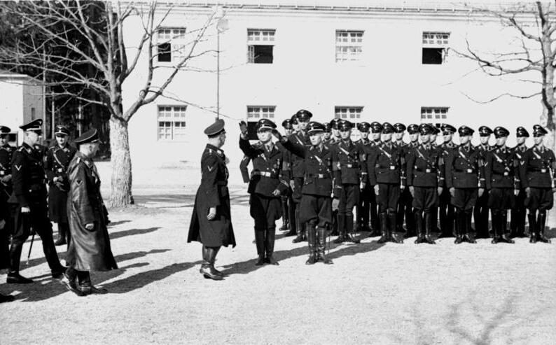 KZ Dachau, Übungslager, Besuch Heinrich Himmler Konzentrationslager Dachau.- Heinrich Himmler bei SS-Junkern im SS-Übungslager Dachau, März 1938 Abgebildete Personen: Himmler, Heinrich: Reichsführer der SS, Deutschland (GND 11855123X)